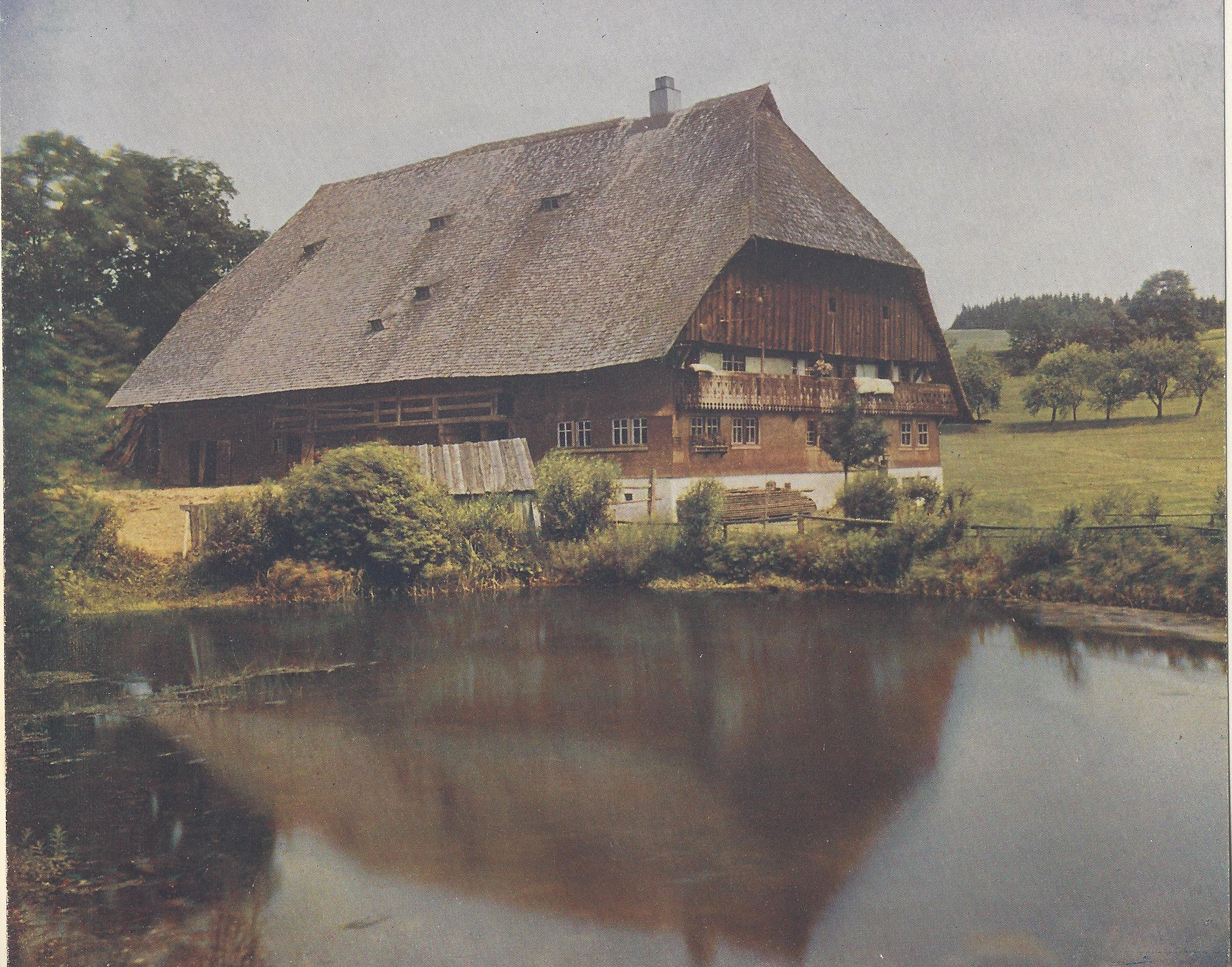 Farbfotografie nach den Autochromverfahren aus: Der Schwarzwald in Farbenphothographien, Wagner Freiburg 1910-1911, Tafel Nr. 38: Brigachquelle